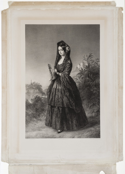 Estampa. La Duquesa de Montpensier.